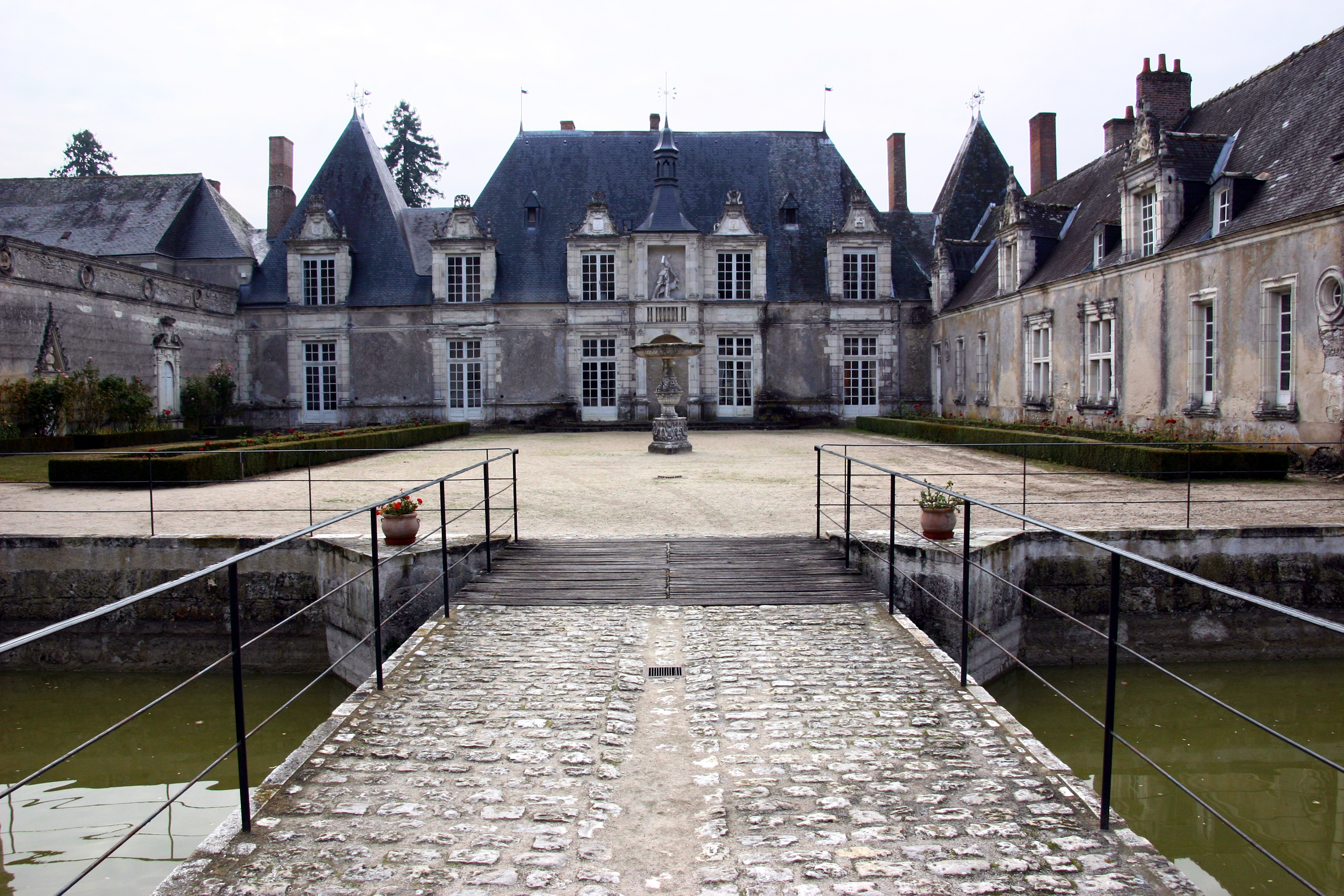 Château de Villesavin